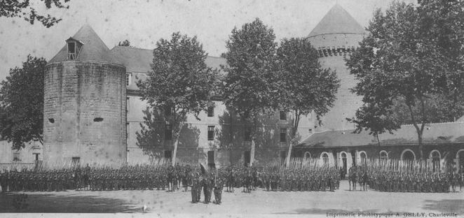 Prise d'armes du 32° Régiment d'infanterie sur la place d'armes de la caserne Meunier (château de Tours)